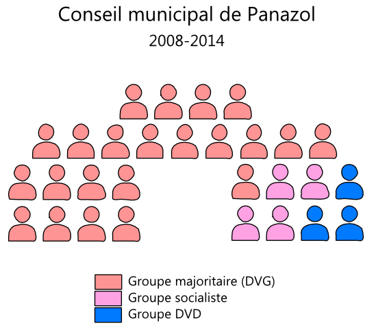 Composition du conseil municipal de Panazol (Haute-Vienne), 2008-2014